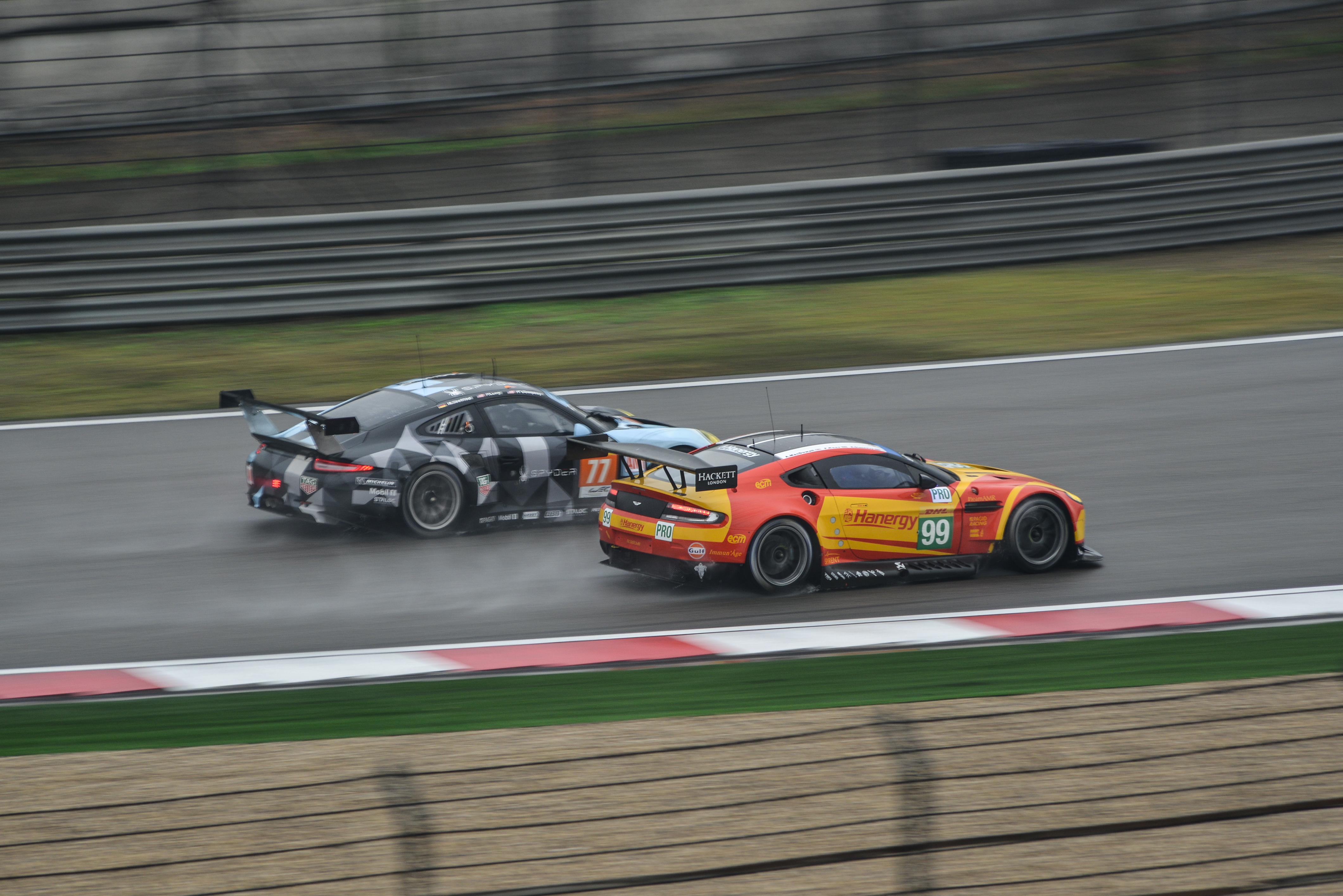 WEC, Shanghai, 2015